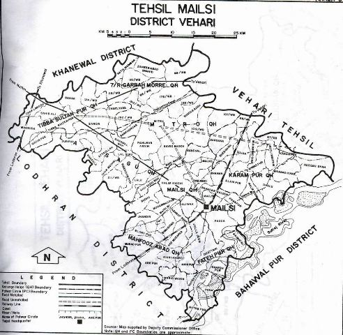 پنجابی: تحصیل میلسی دے پنڈاں دا نقشہ